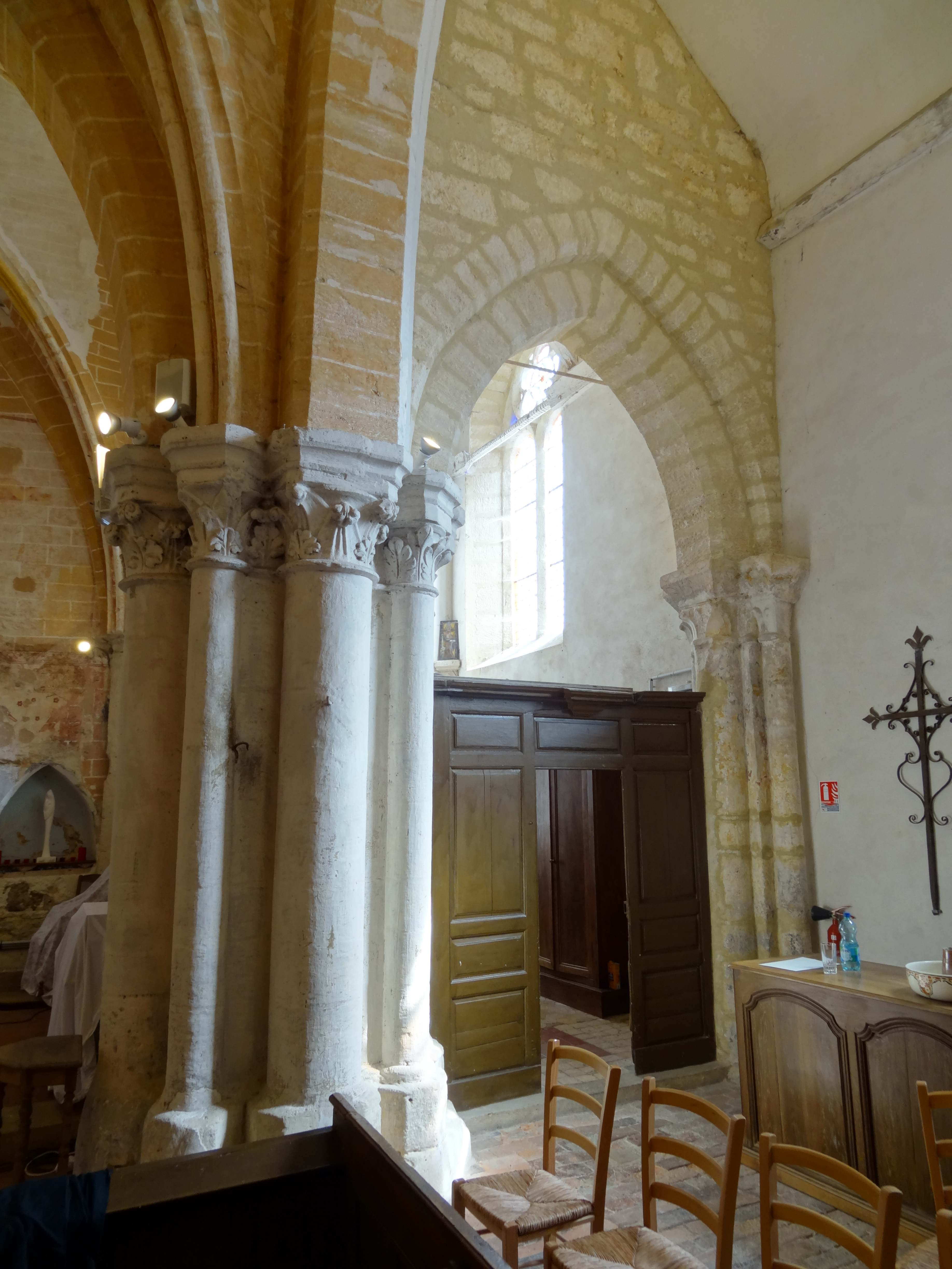 Intérieur de l'église - voir titre.